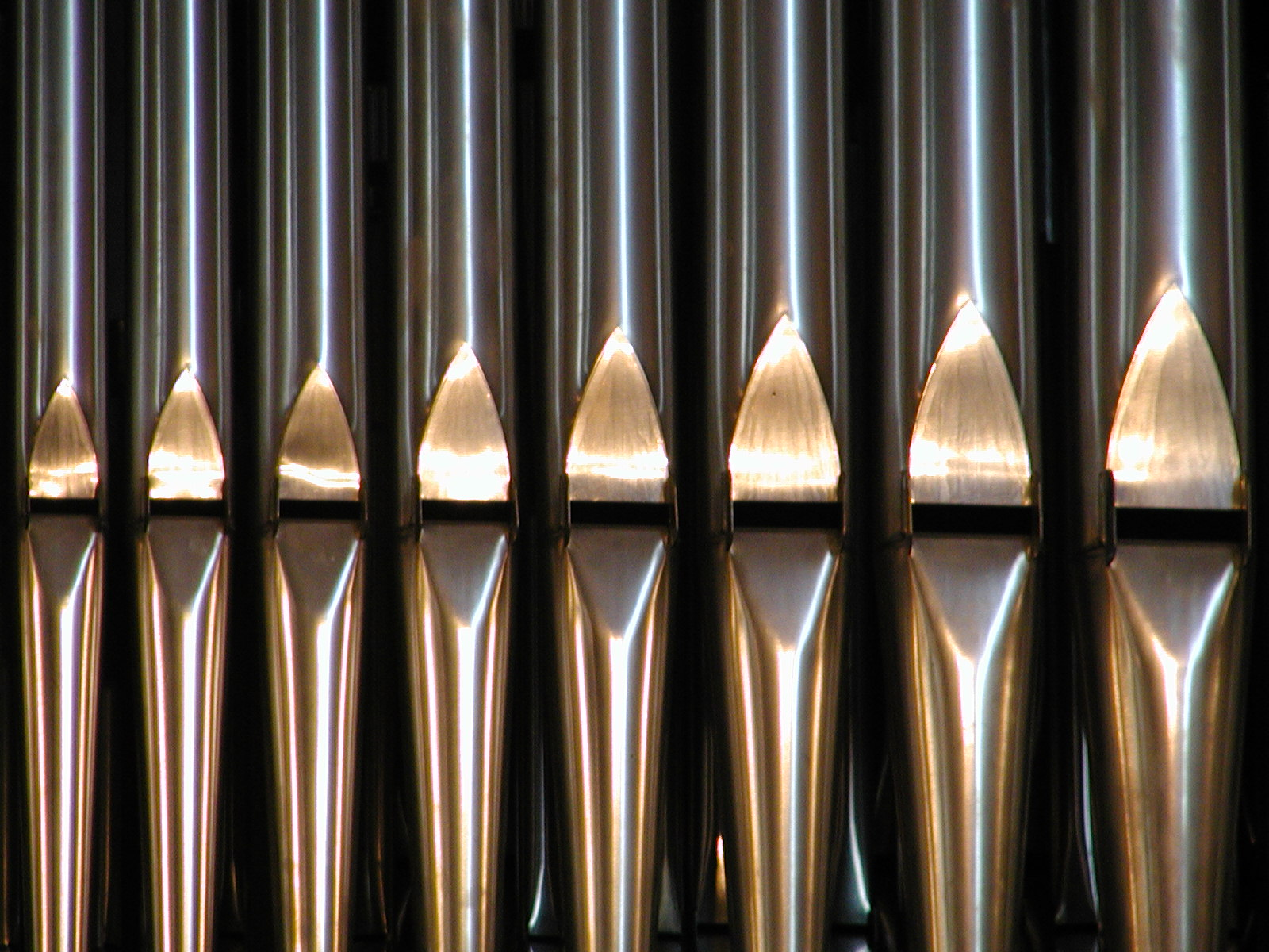 Prospektpfeifen einer Orgel; selbst fotografiert 7/2006 von Benutzer:Kantor.JH